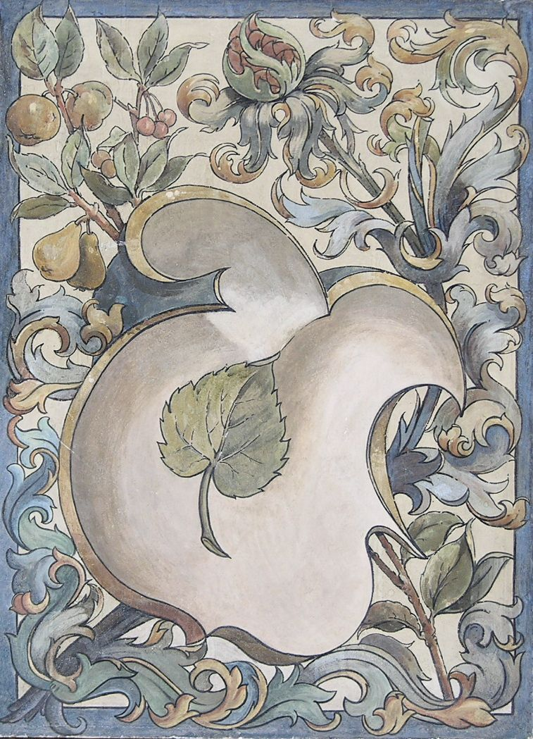 Bild am Verputz im zweiten Stock des Albert-Einstein-Hauses der Alten Kantonsschule Aarau mit dem Wappen des Fricktals